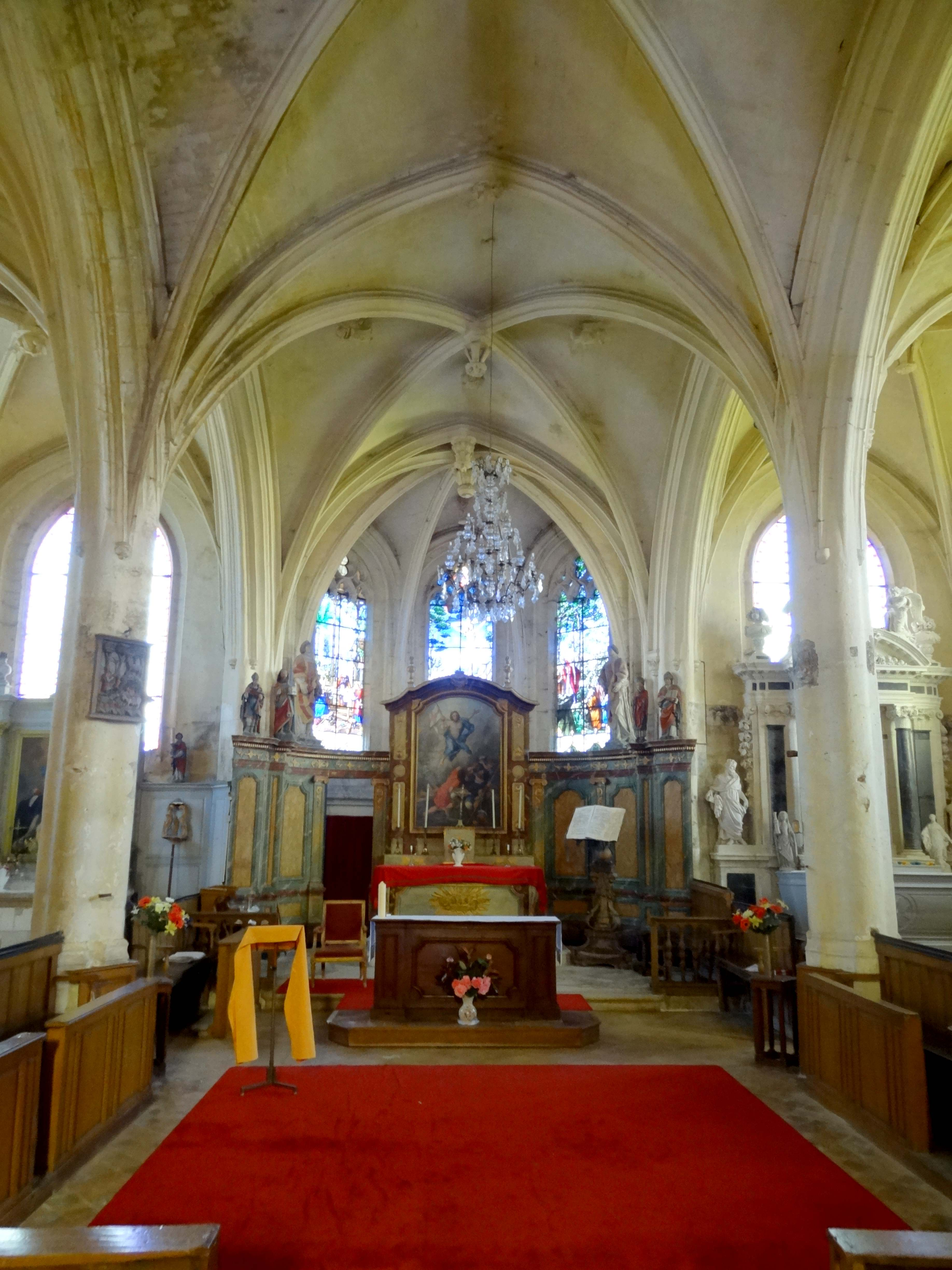 Intérieur de l'église - voir titre.